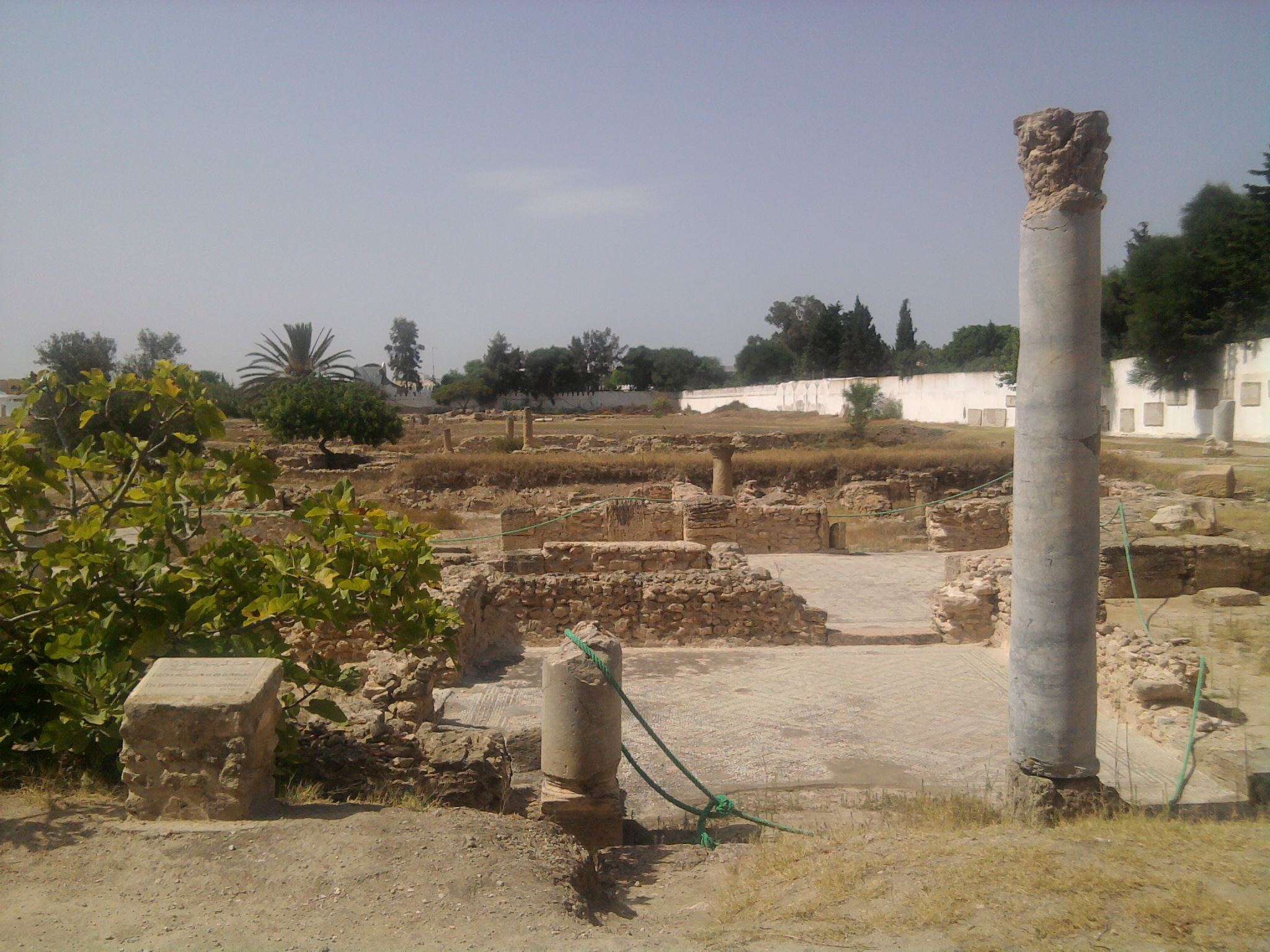 Tunisie, Site archéologique de Hammamet, Batiment de Satyre et Ménade, Pupput